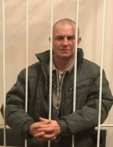 Володимир Михайлович Дудка - політичний в'язень Кремля